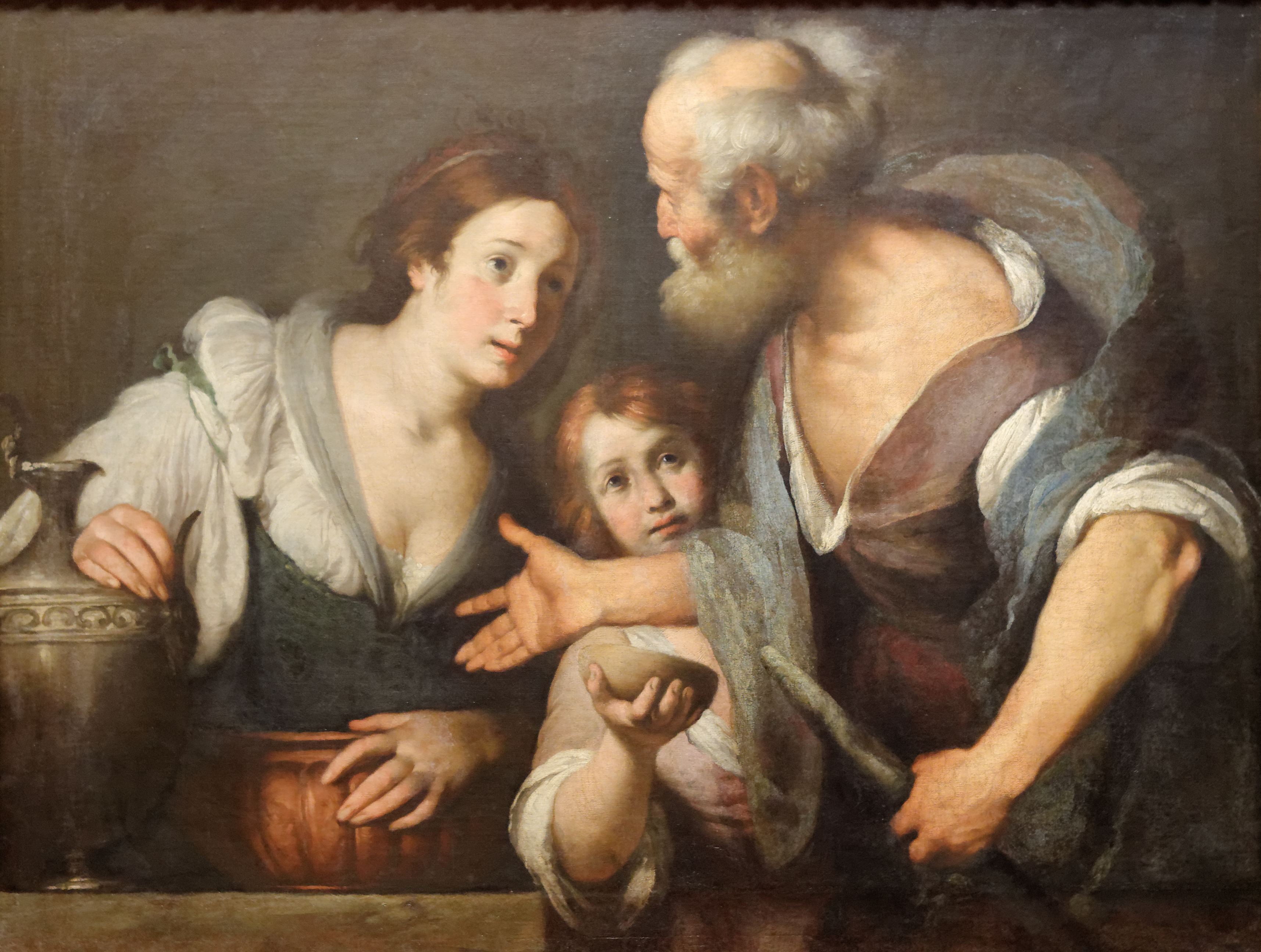 La Veuve de Serepta s'apprête à utiliser l'huile et la farine et la farine qui lui reste pour faire à manger au prophète Élie lorsque son jeune fils lui offre à boire. Bien que marqué par le désespoir de la faim imminente, son visage révèle aussi le joyeux message que lui donnait Élie : comme récompense pour sa générosité, ses pots seront toujours bien rempli